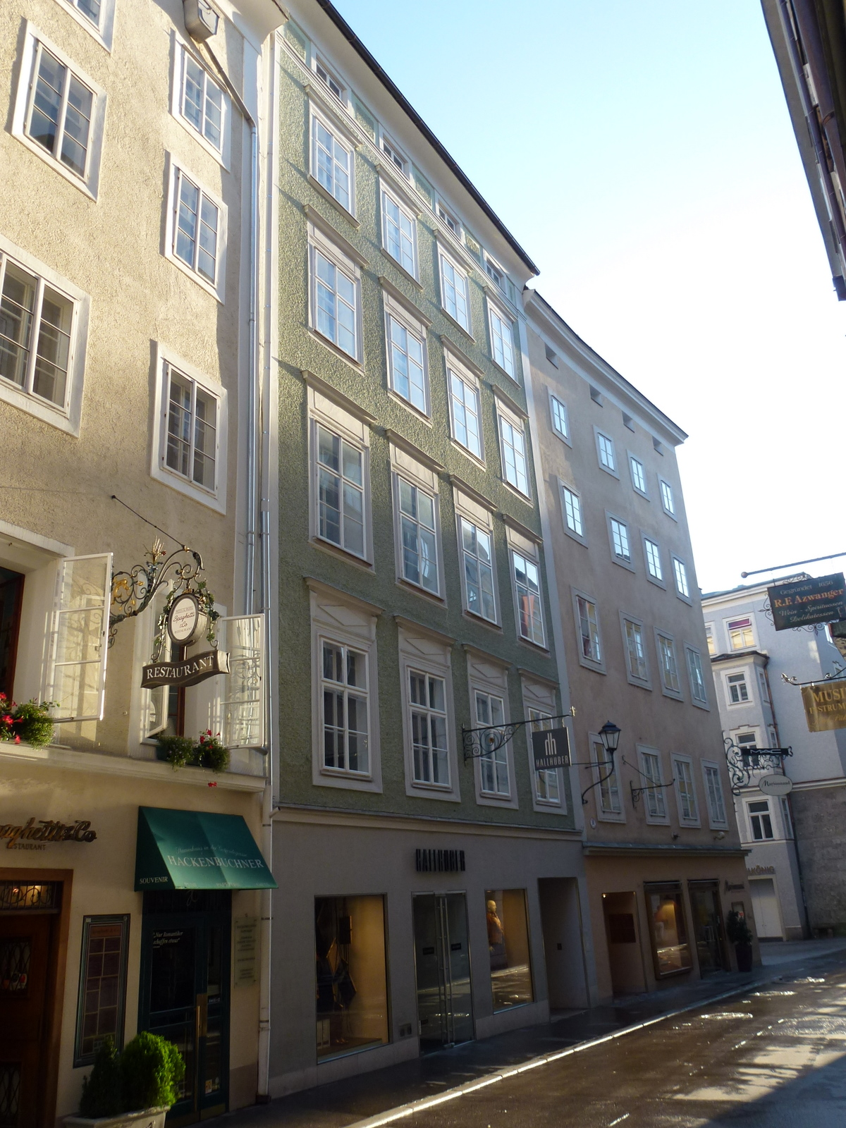 Wohn- und Geschäftshaus, Kammerlohrhaus